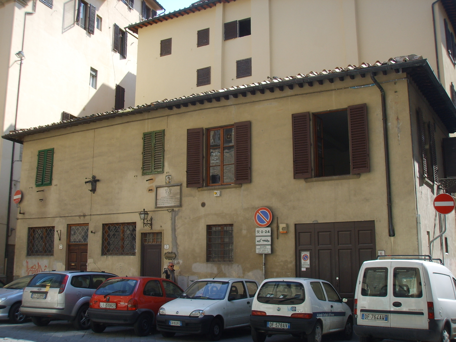 Ex loggia dei peruzzi